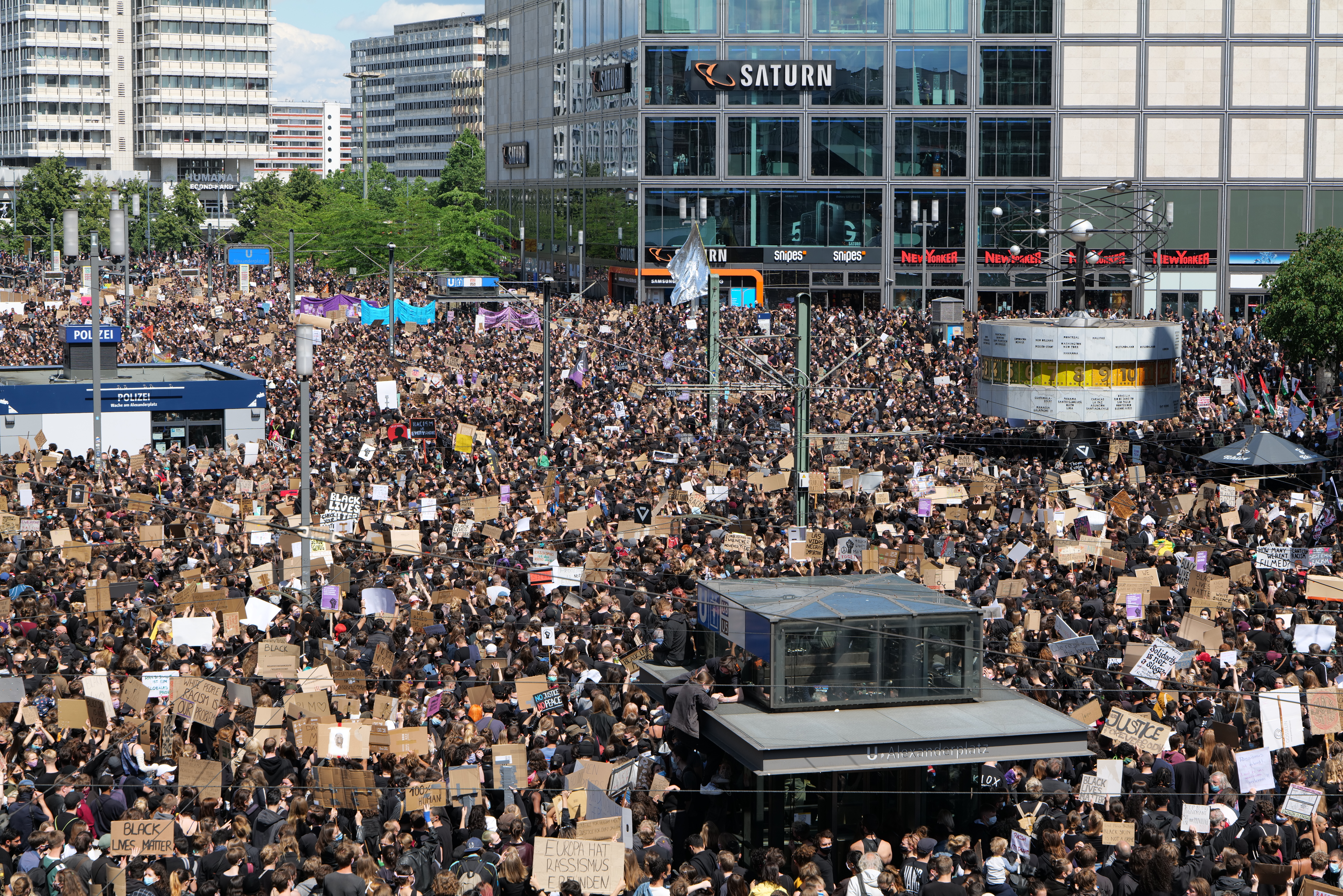 BlackLivesMatter Kundgebung am Alexanderplatz in Berlin am 6. Juni 2020.